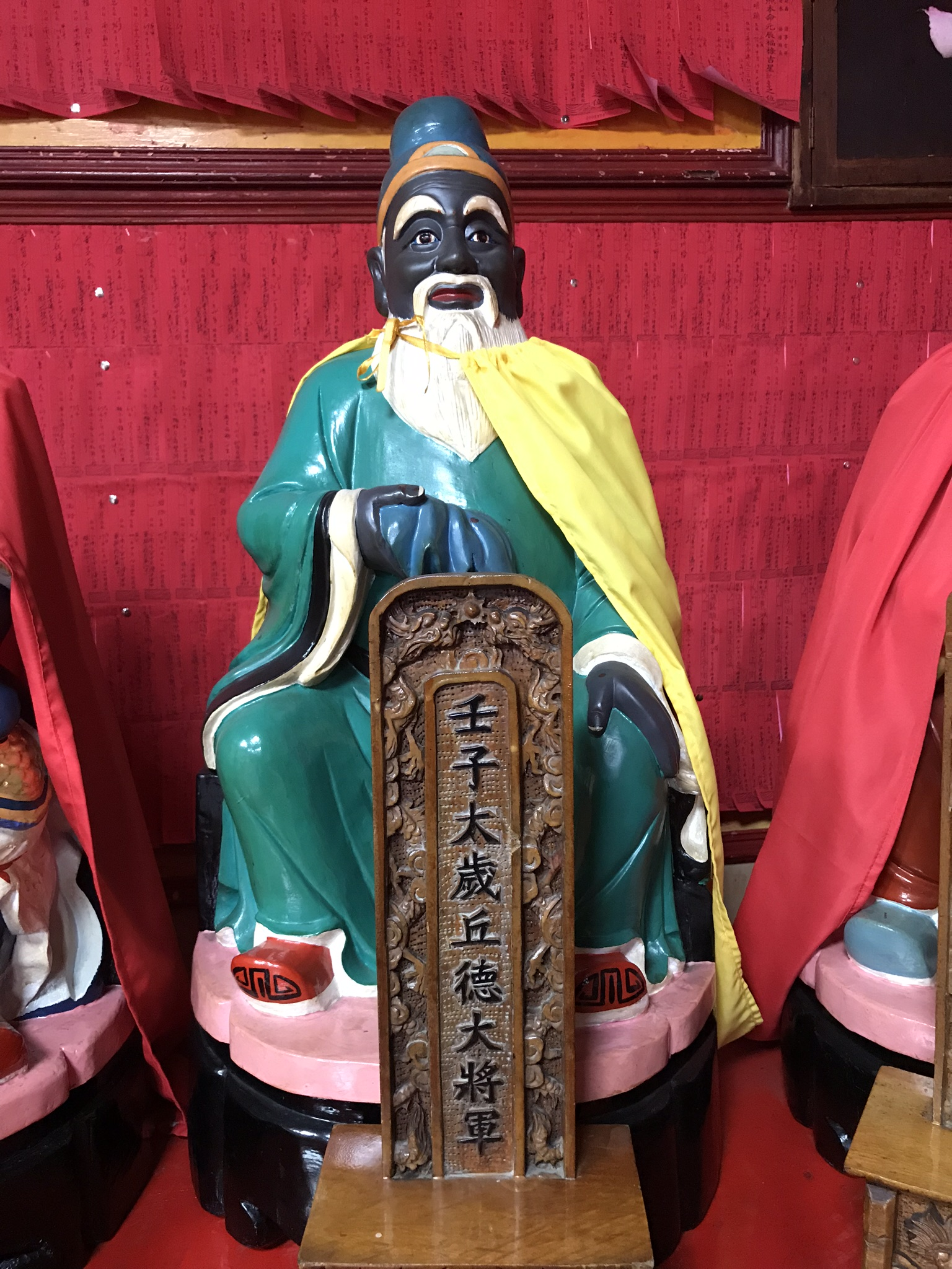 麻豆代天府壬子太歲丘德大將軍神像